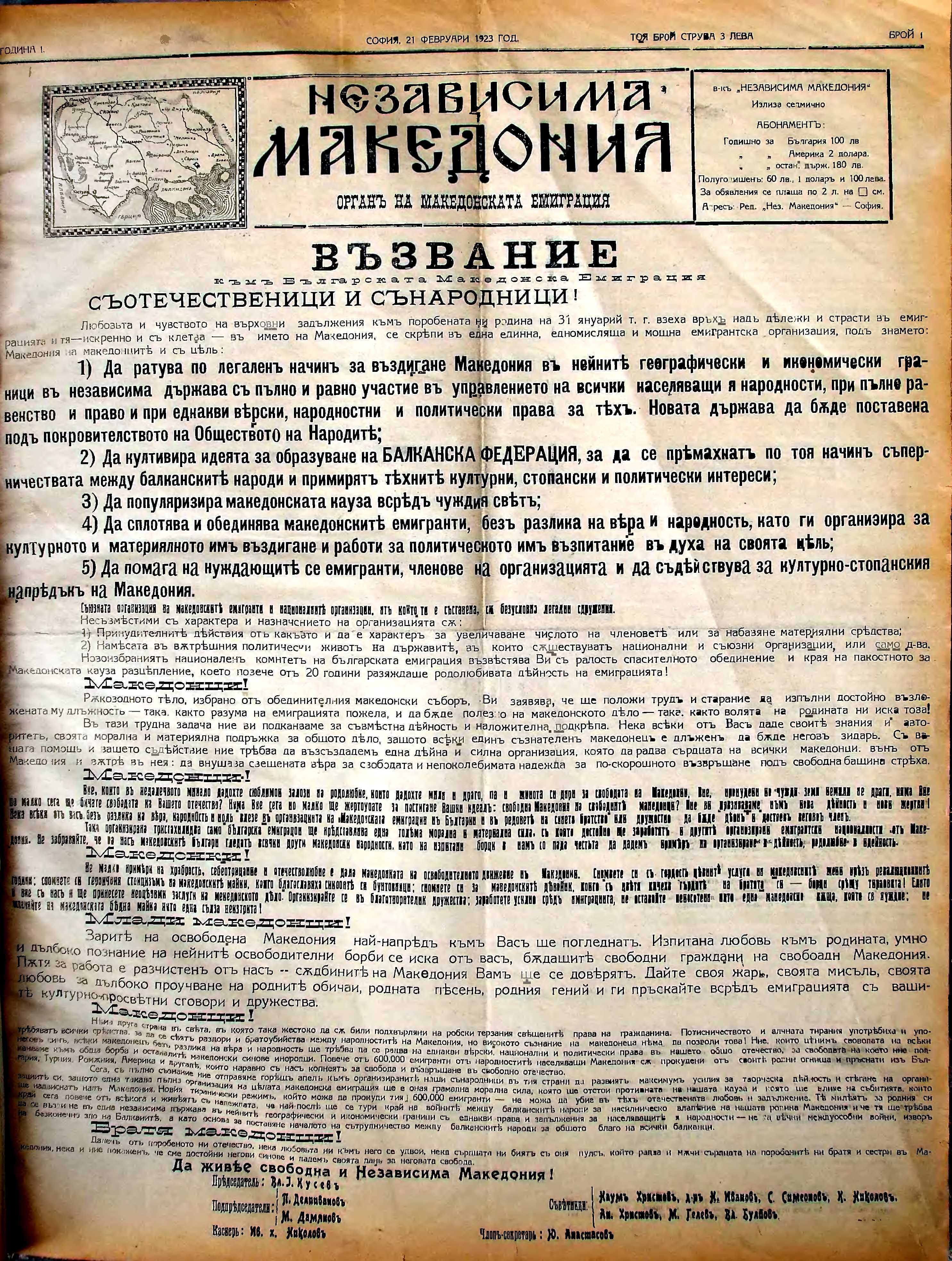 Главата на вестник Независима Македония, година 1, брой 1.